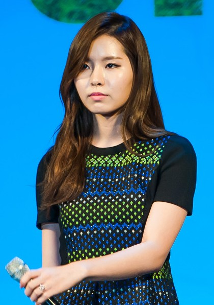 130929 그린 리본 마라톤 대회 희망콘서트